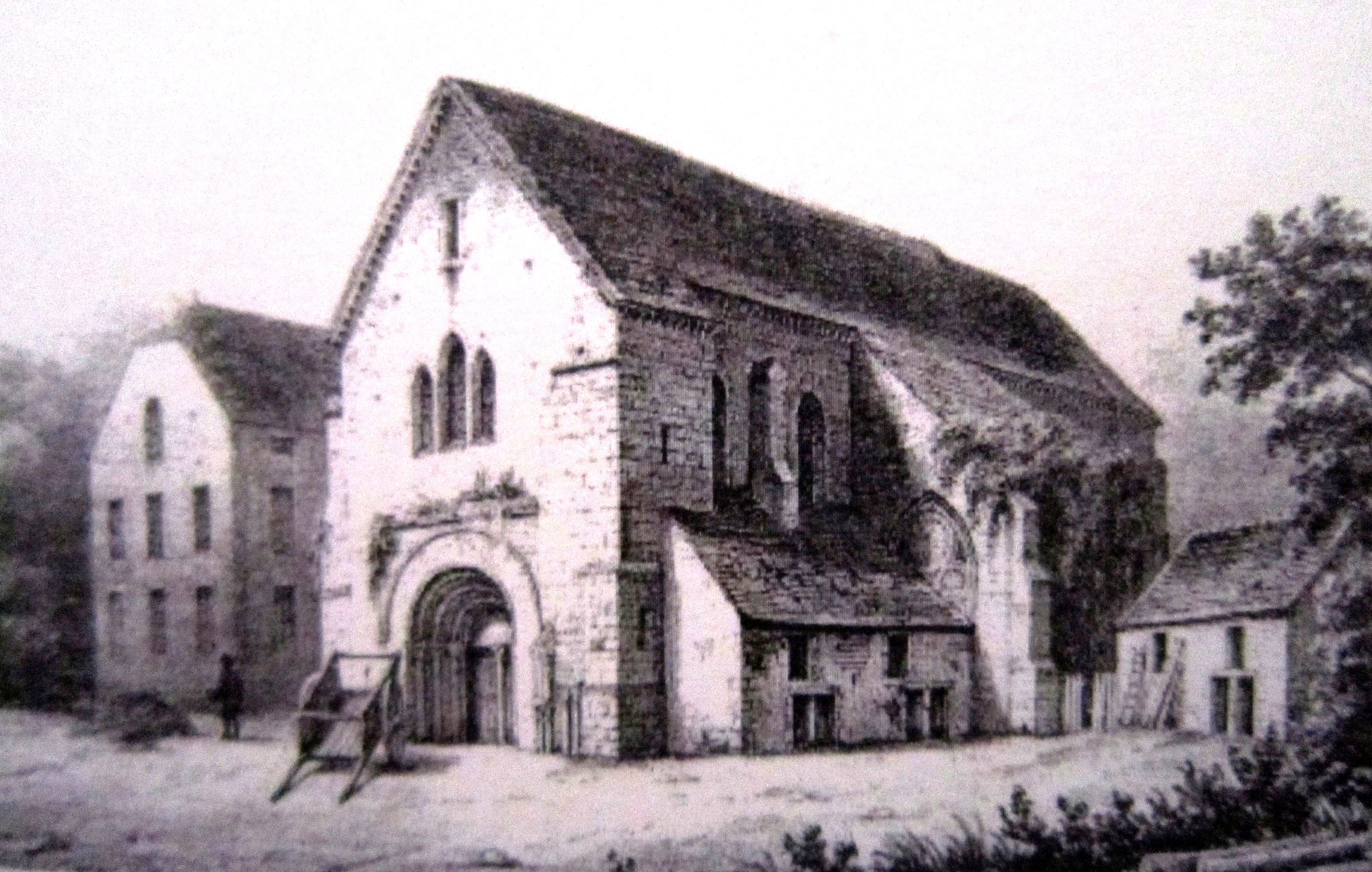 Gravure ancienne représentant la chapelle de la commanderie templière d'Epailly (Courban, Côte-d'Or)